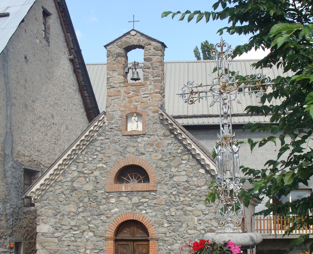 Façade de la chapelle des Ranguis, commune de Saint-Jean-Saint-Nicolas (Hautes-Alpes). Sur la droite, calvaire en fer forgé.